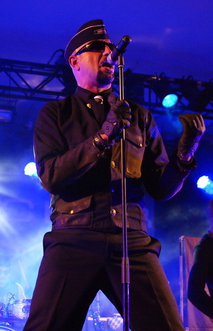 Alexander "Alexx" Wesselsky von Eisbrecher auf dem Amphi Festival 2010